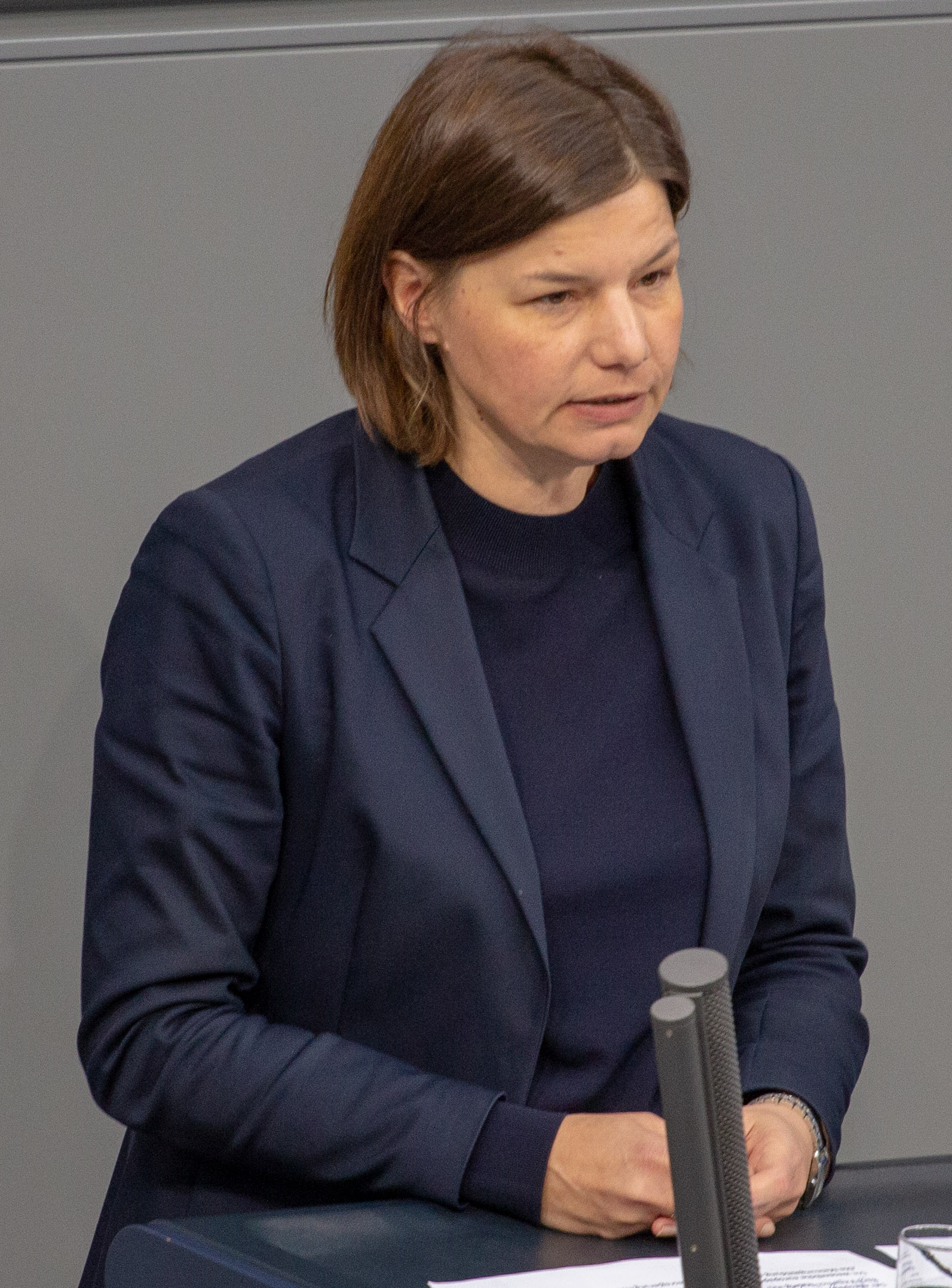 Manuela Rottmann, Mitglied des Deutschen Bundestages, während einer Plenarsitzung am 12. April 2019 in Berlin.